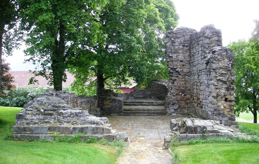 Stein kirkeruin i Hole, Buskerud